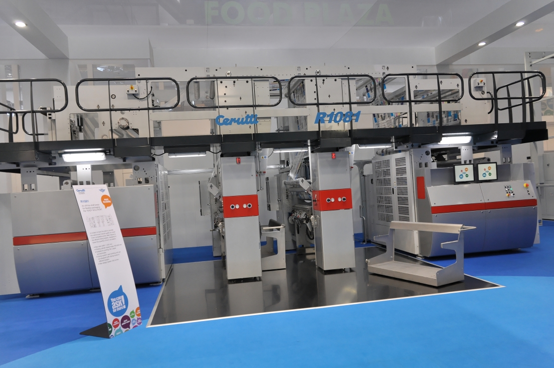 Bilder von der Drupa 2012 Drupa 2012